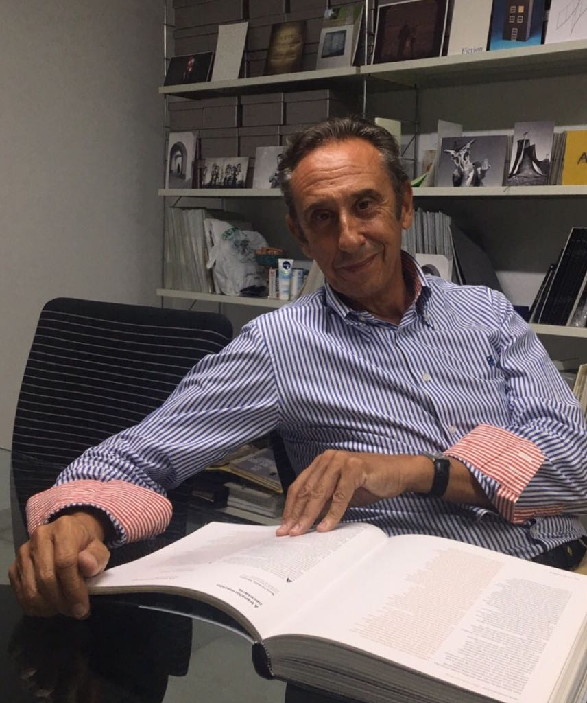 J. Benito Fernández fotografiado por Nuria Carballo (2017)